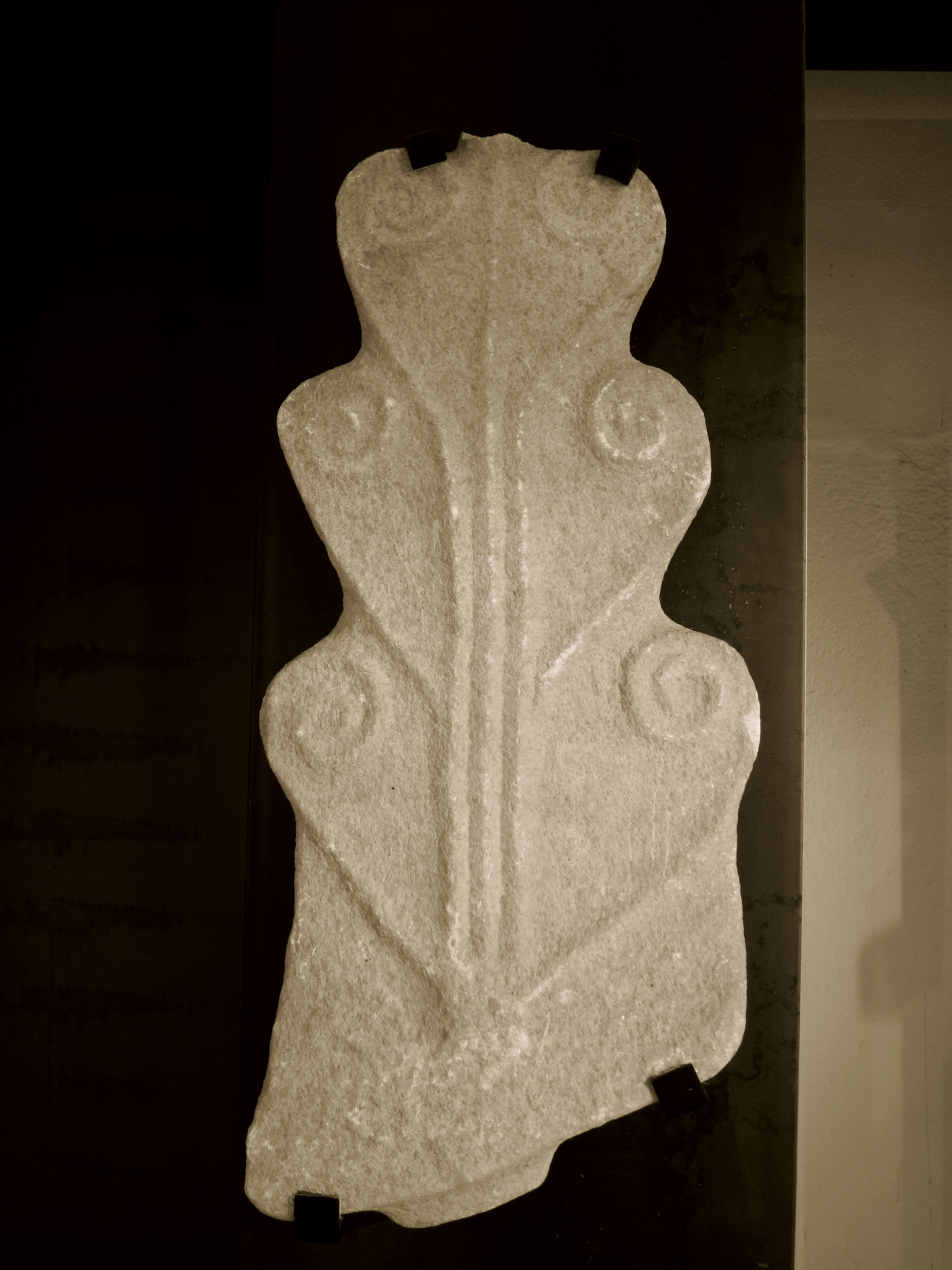 Saint-Lizier (Ariège, France) : Antéfixe de la villa gallo-romaine de Taurignan-Vieux (Ariège). Marbre blanc à gros cristaux. Antiquité tardive. Découverte dans les années 1960.